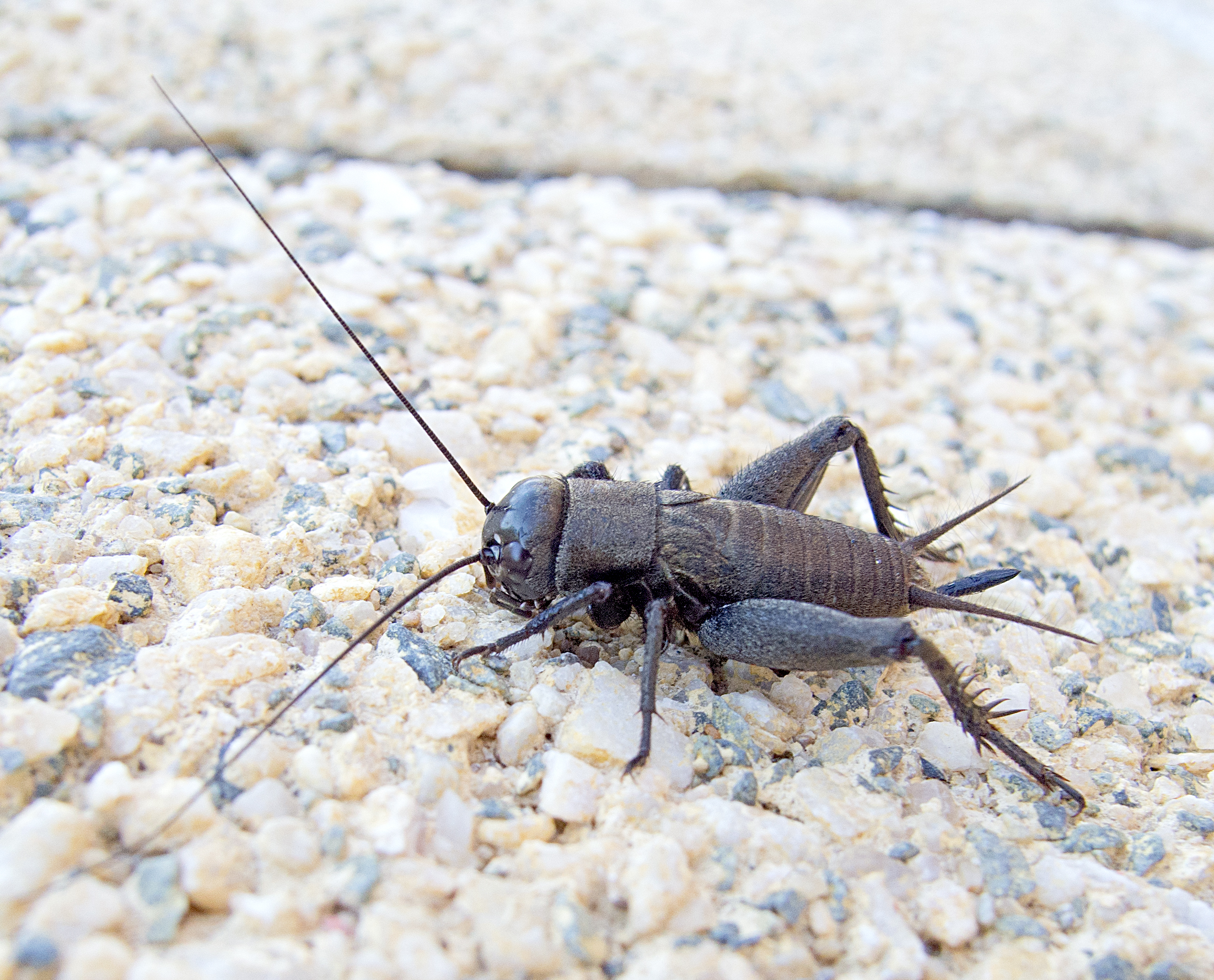 Полевой сверчок / Gryllus campestris / European field cricket / Полски щурец / Feldgrille